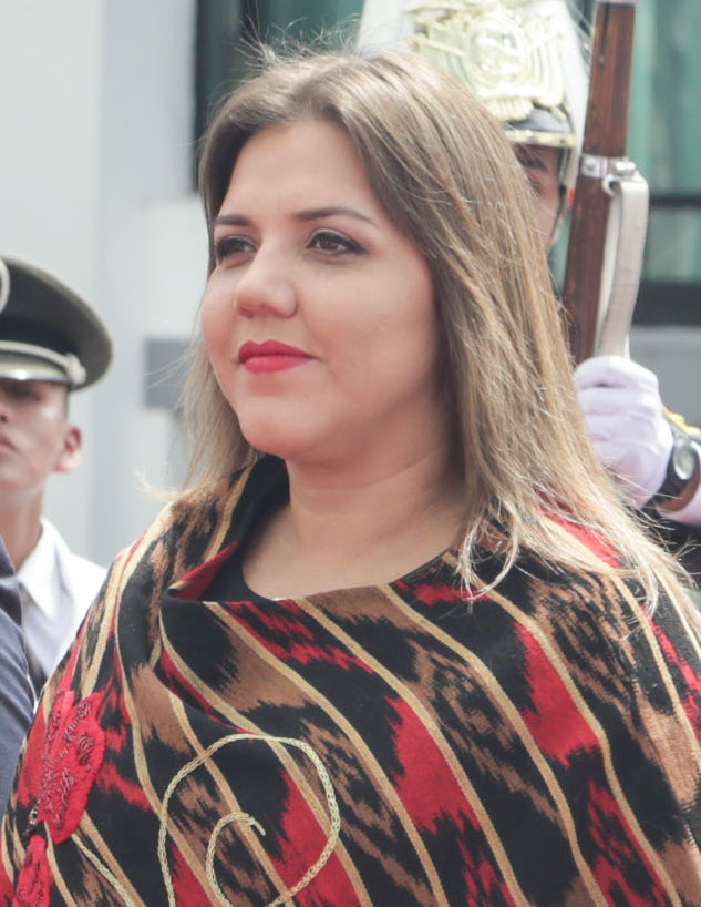 Quito, 24 de mayo 2018.- Sesión Solemne del Pleno de la Asamblea Nacional. Fotos: Equipo de Fotografía / Asamblea Nacional Quito, 24 de mayo 2018.- Sesión Solemne del Pleno de la Asamblea Nacional. Fotos: Equipo de Fotografía / Asamblea Nacional